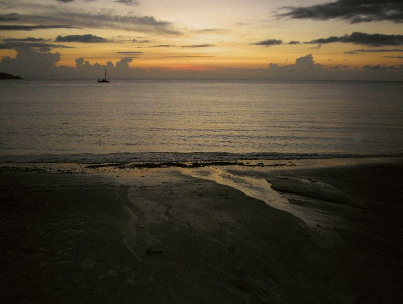 Coucher de soleil sur Tahiti plage, près de Sada, Mayotte